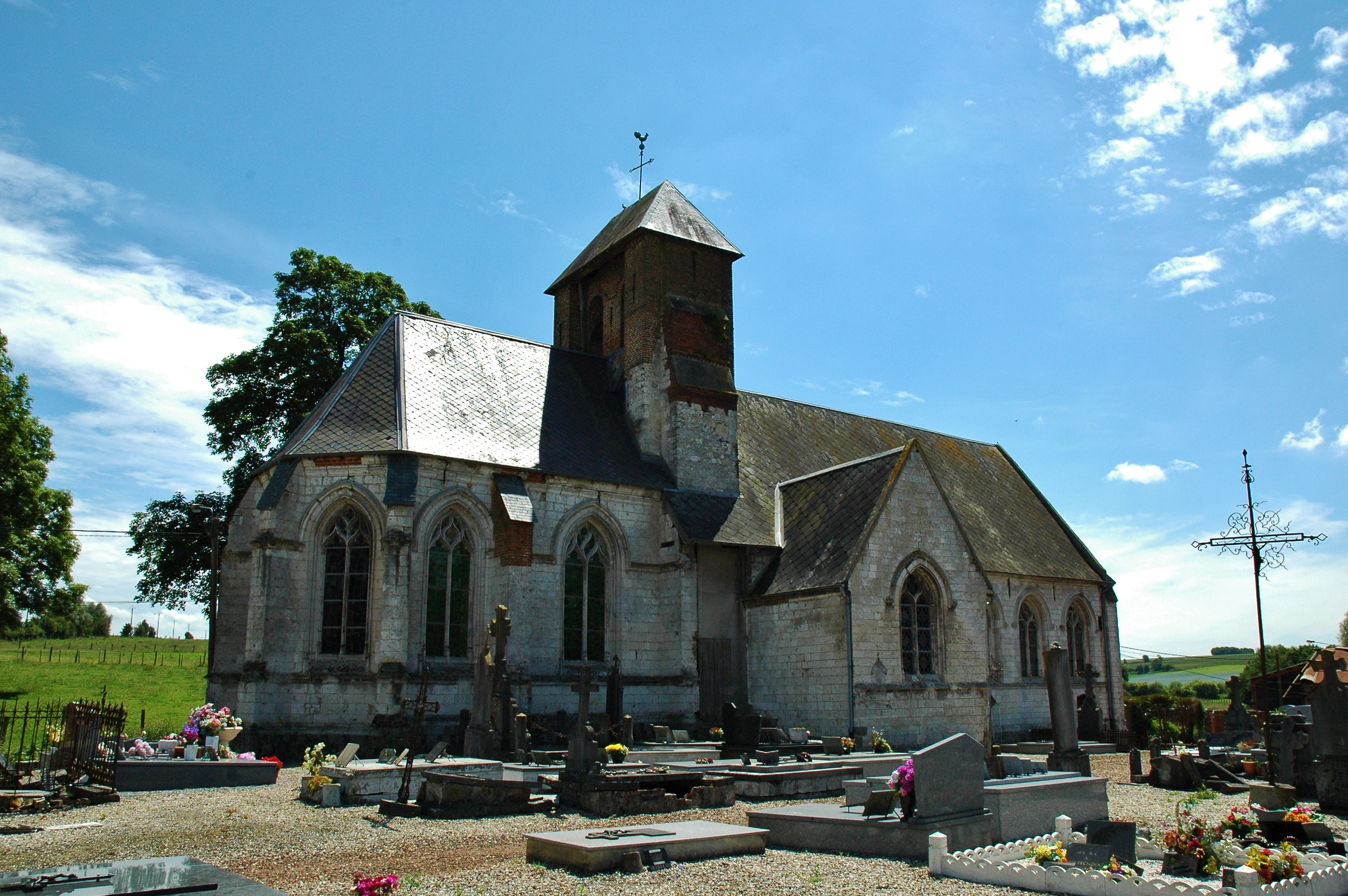 Eglise de Wamin, XV et XVI siècle